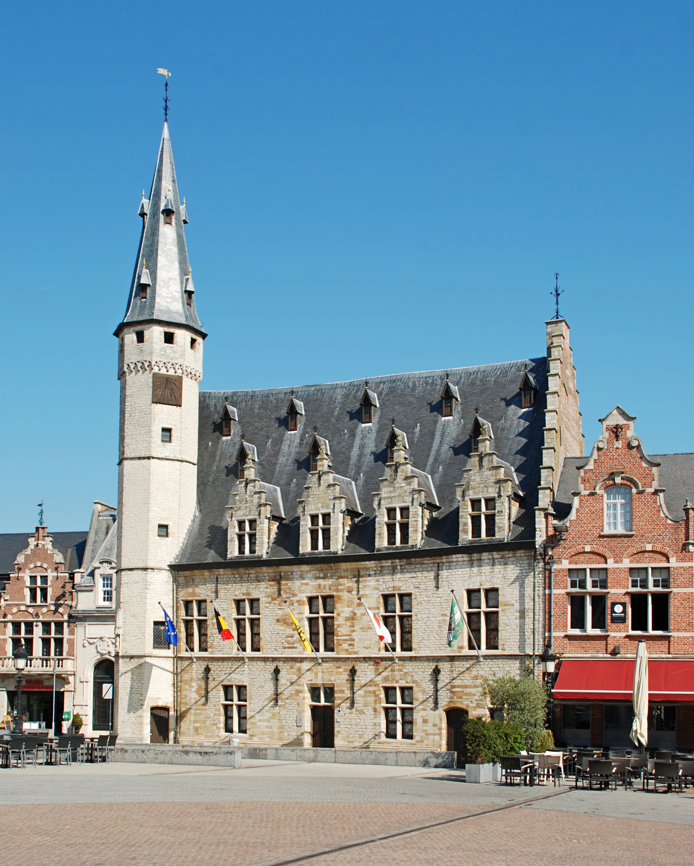 Belgique - Termonde (Dendermonde) - Halle aux viandes (Vleeshuis)